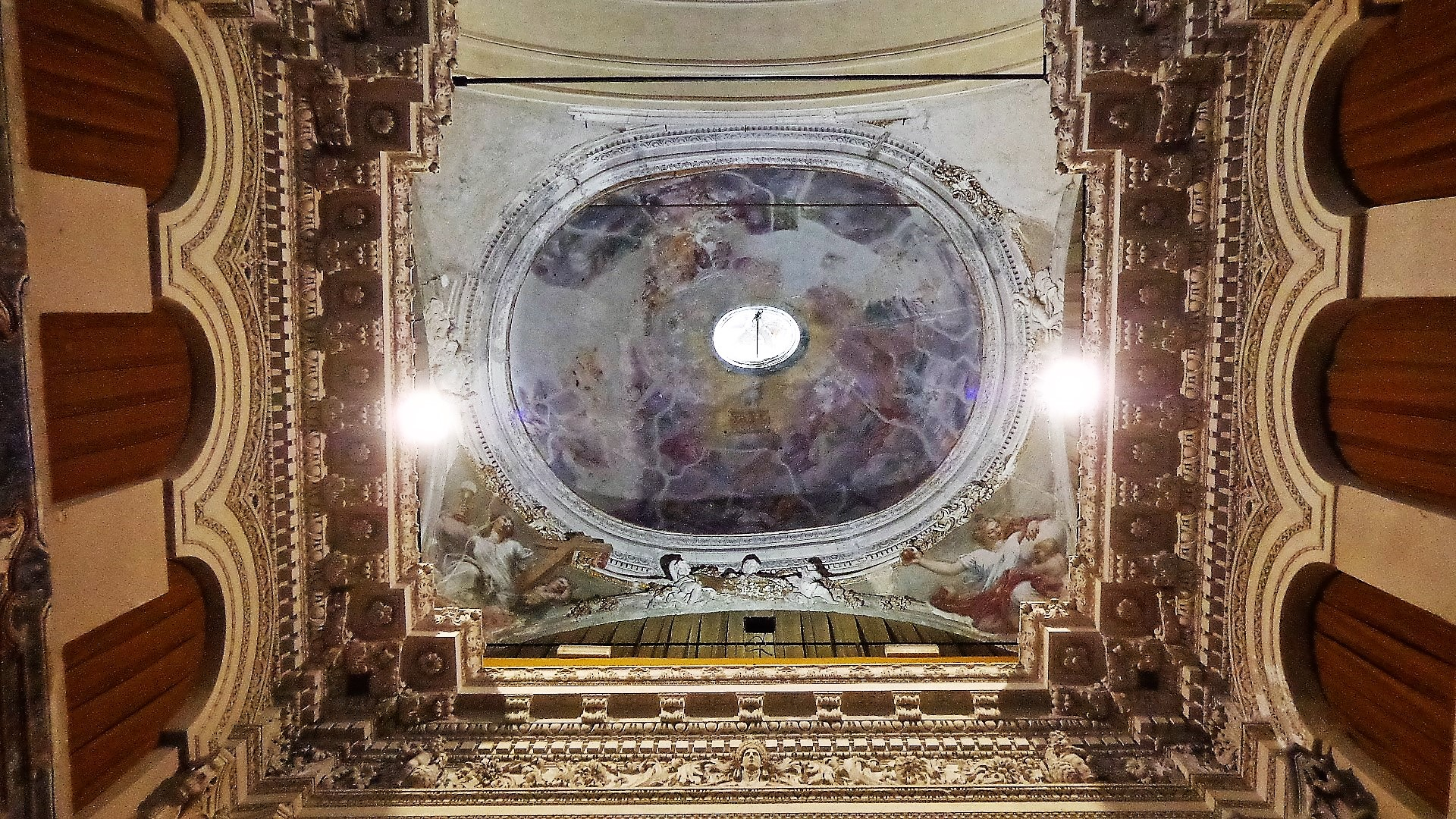 Cupolino meridionale con affresco Adorazione dell'Agnello Mistico di Filippo Tancredi.